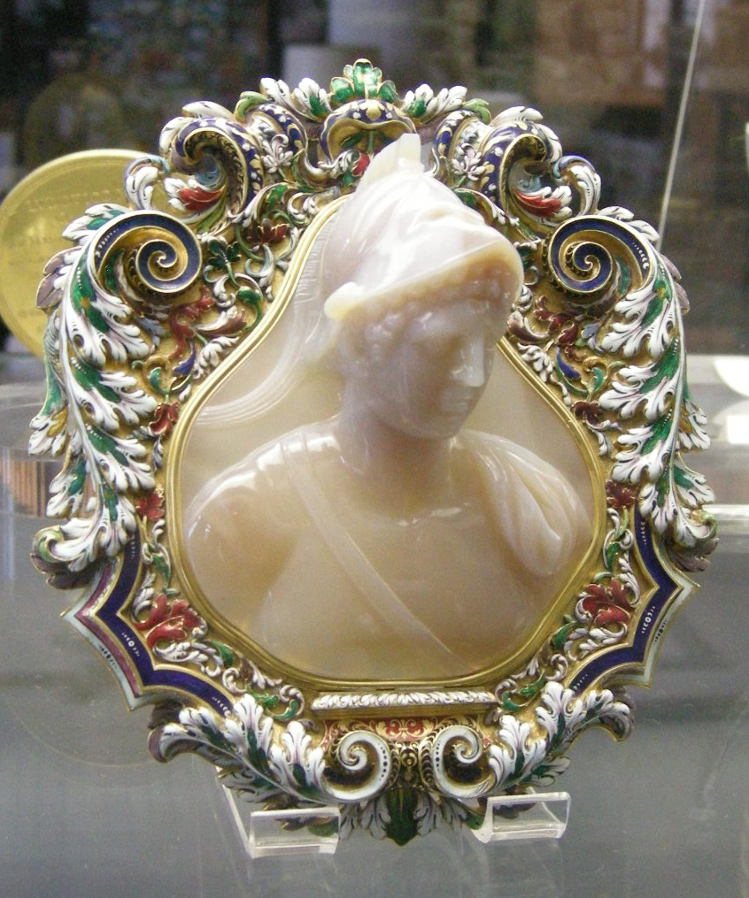 Camée représentant Ptolémée II assimilé à Alexandre le Grand. Camée en calcédoine grise. Alexandrie? 2e tiers du IIIe siècle av. J.-C. Monture en or émaillé de l'orfèvre Josias Belle, Paris, fin du XVIIIe siècle